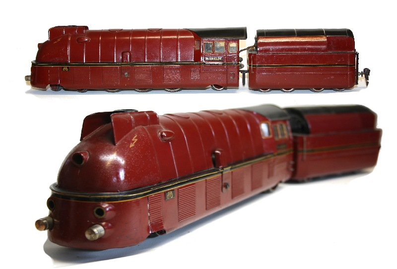 Märklin Tinplate Stomlinien-Dampflokomotive SLH 70/12920, Spur 0, eine Nachamung der roten 05 001 aus der durch Borsig gabauten Baureihe 05 der Deutschen Reichsbahn (DR).